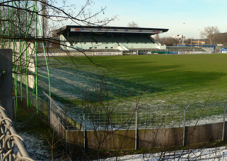 Rudolf-Kalweit-Stadion Hannover